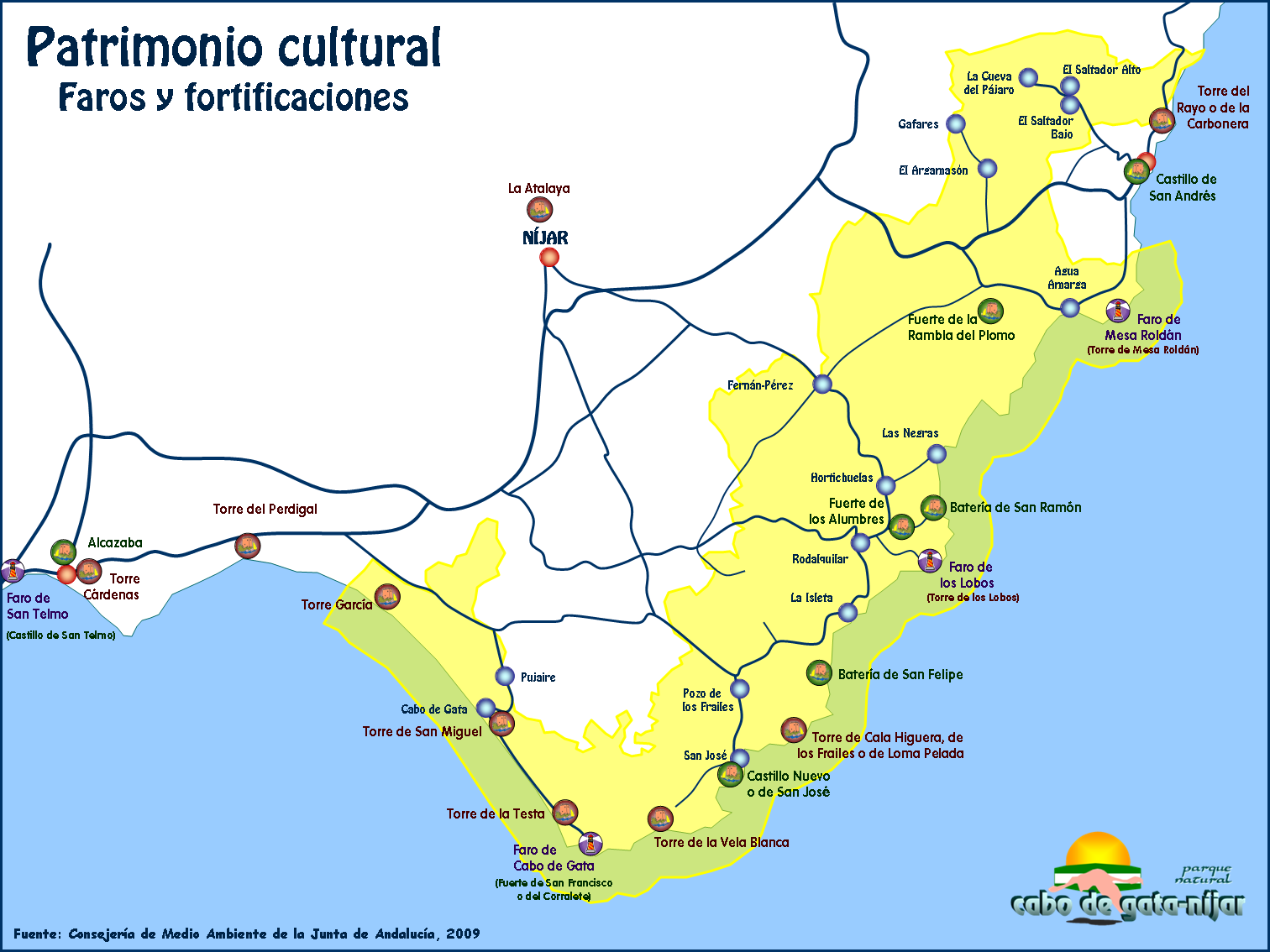 Ubicación de los faros, torres y fortificaciones del Parque Natural Cabo de Gata-Níjar.